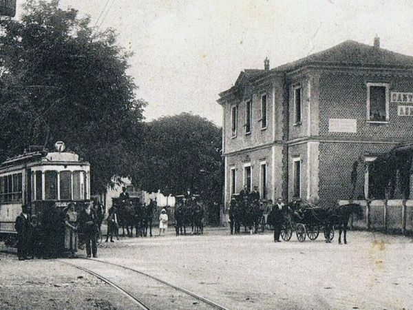 Stazione ferroviaria di Cantù Asnago (oggi "Cantù-Cermenate"). In sosta un tram della linea Como-Cantù-Asnago.